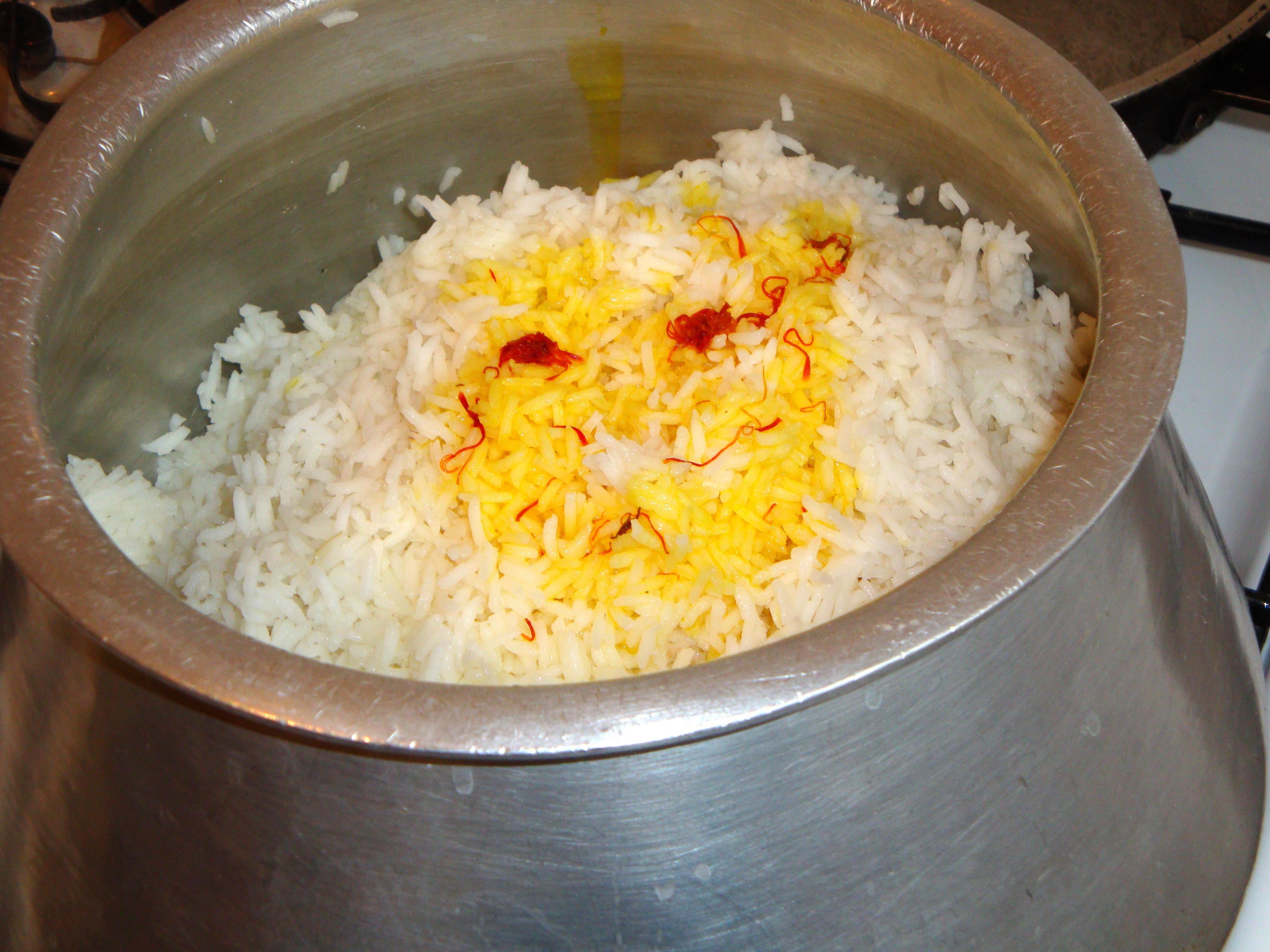 Azərbaycanda plovun 200 növü var və plov Azərbaycan mətbəxinin şahı sayılır.